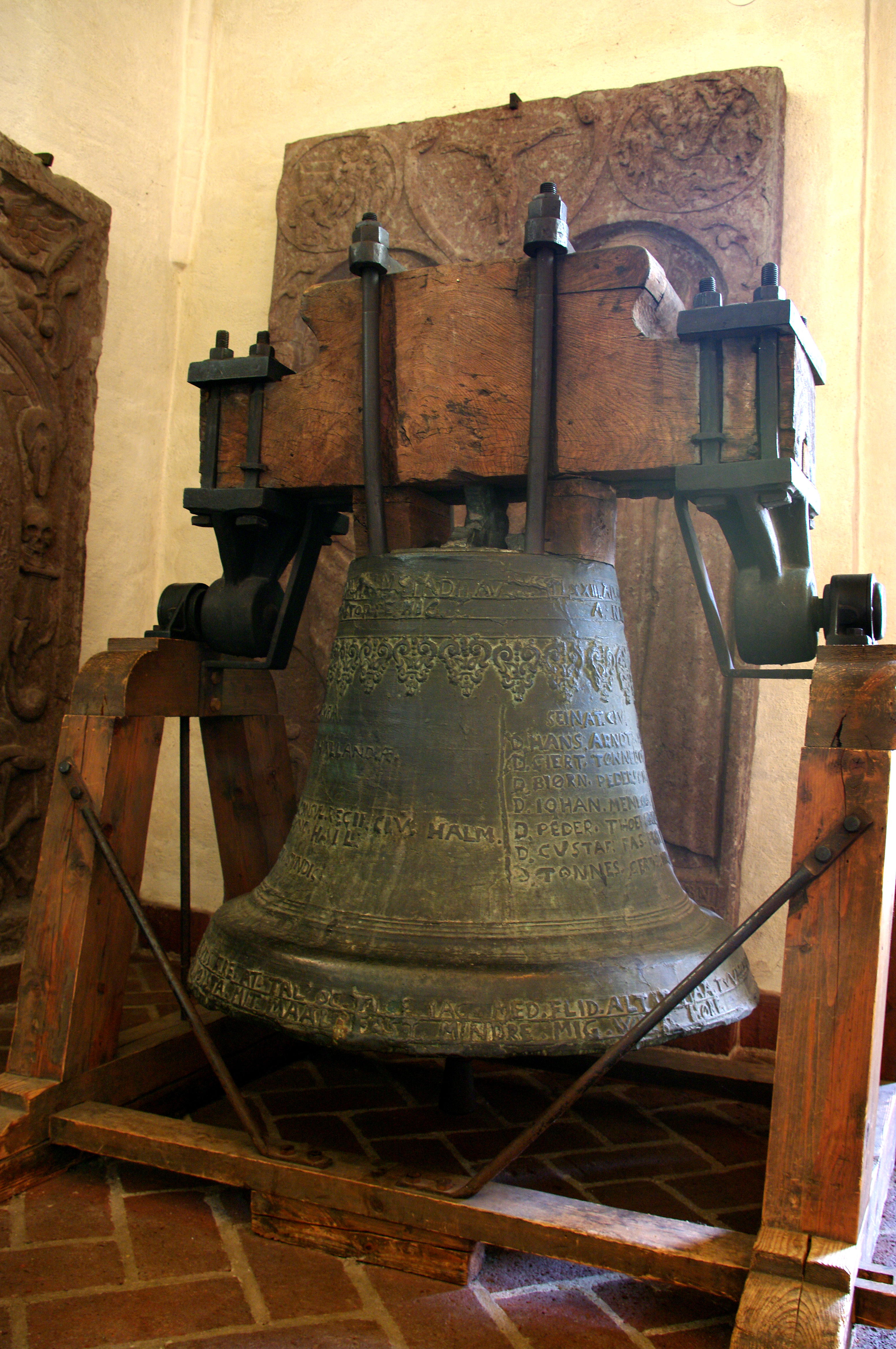 Halmstad kyrka i Sverige.